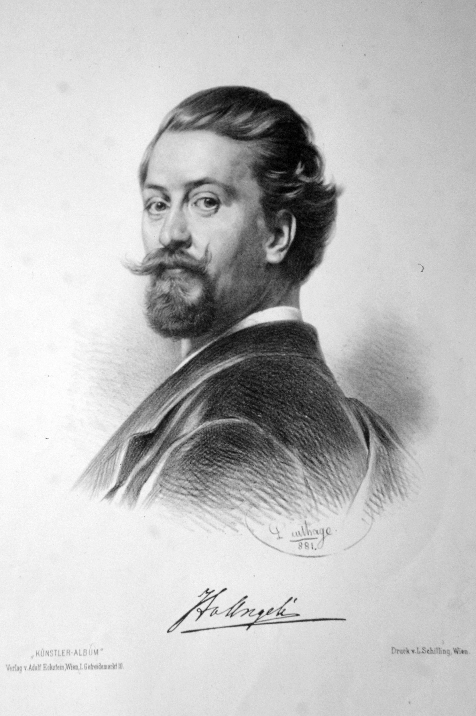 Adolf Dauthage, 1881 Aus der Serie "Künstleralbum"